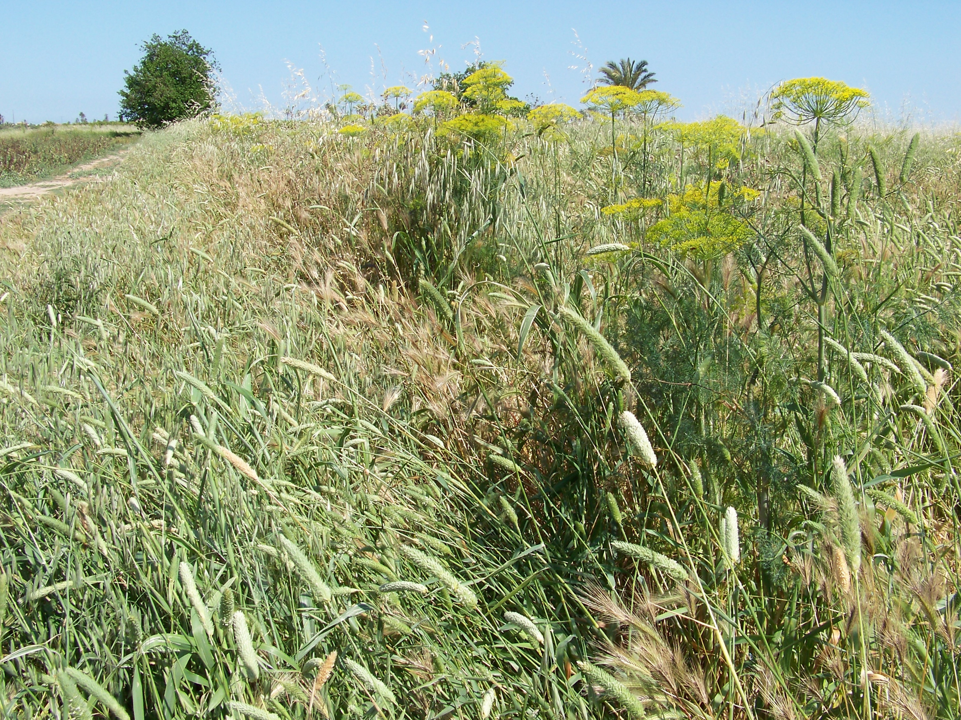 Foeniculum vulgare (Hinojo) : Cultivo - Sendica de Albatera, circa cruce con carretera CV-900, Granja de Rocamora (Alicante, España).